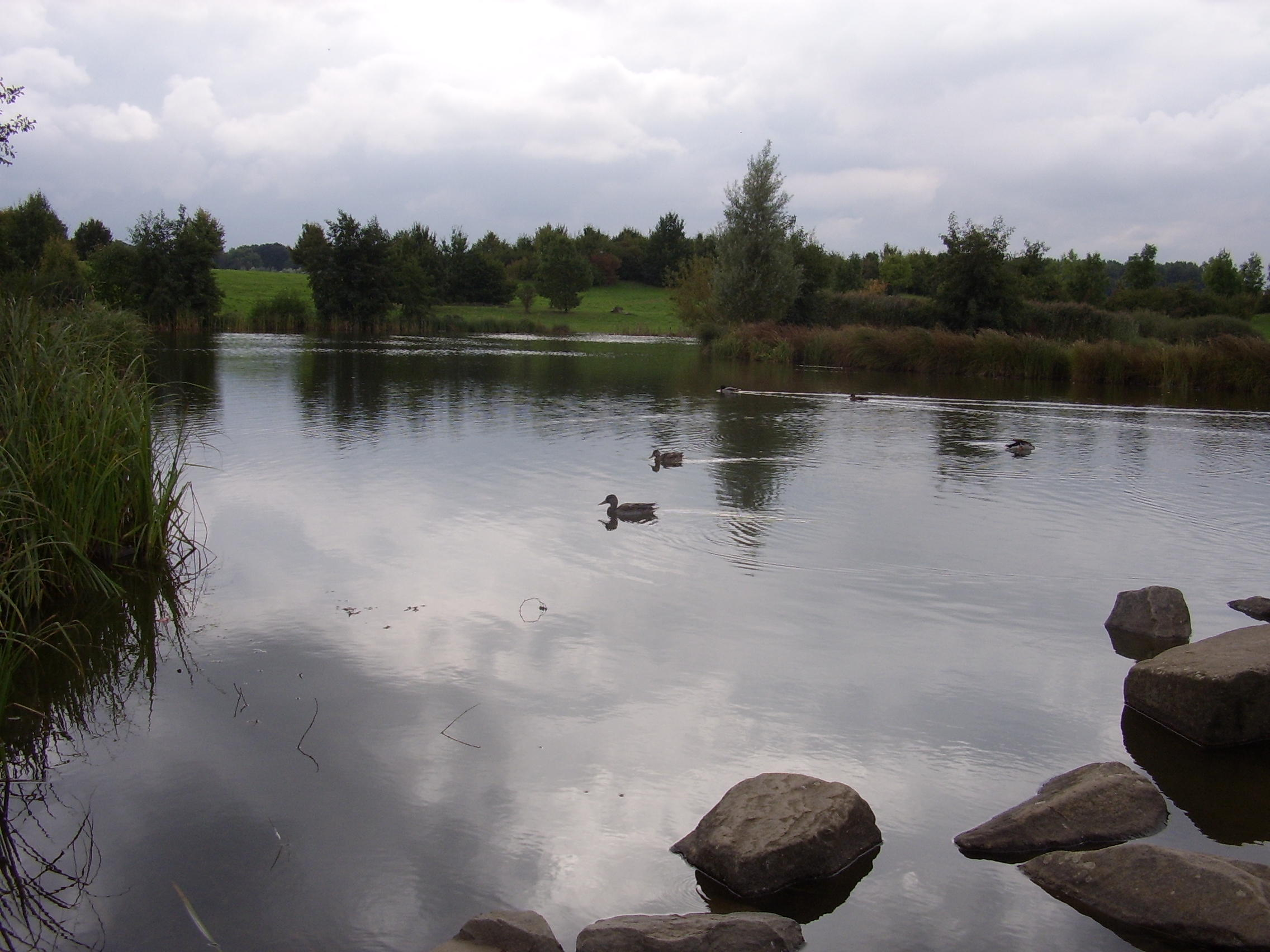 See in Allerheiligen